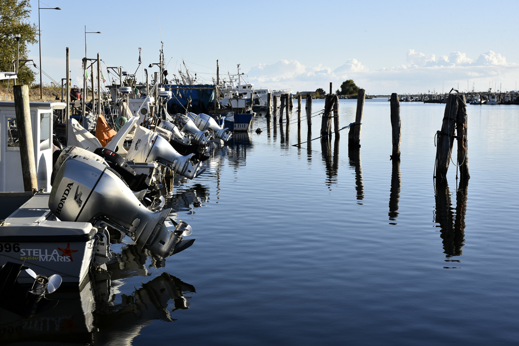 Marina di Goro This is a photo of a monument which is part of cultural heritage of Italy.